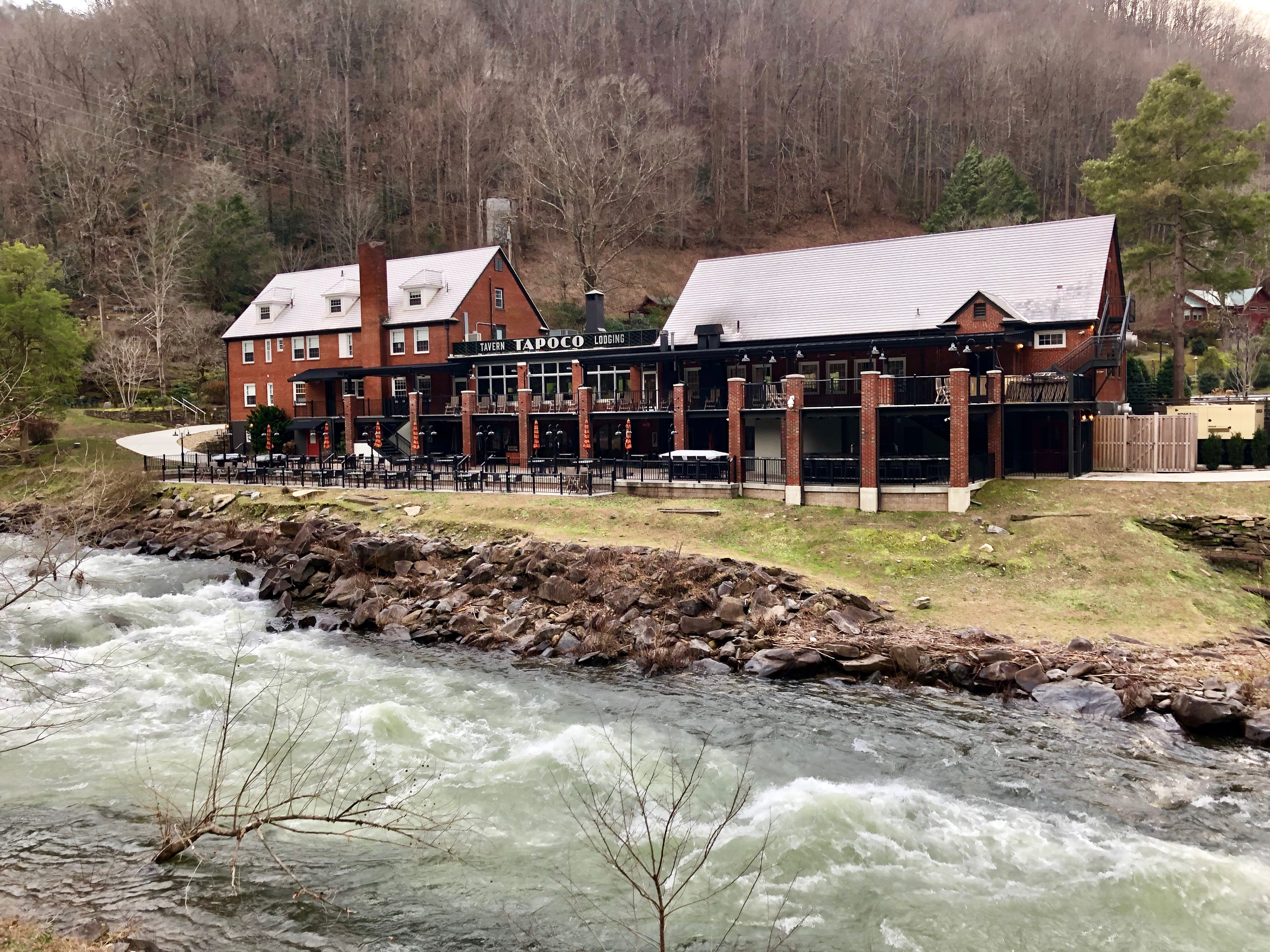 Tapoco Lodge, Tapoco, NC